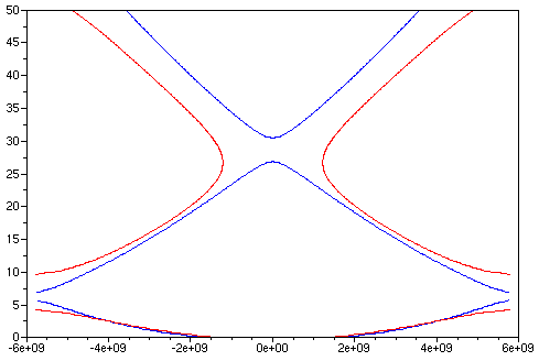 Particle in a one-dimensional lattice (periodic potential): blue - Kronig-Penney model, red - Dirac model